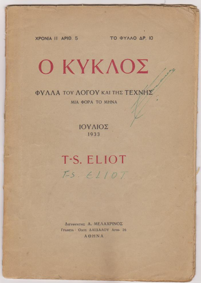 Ο Κύκλος, λογοτεχνικό περιοδικό, Ιούλιος 1933, Αφιέρωμα στον T.S. Eliot